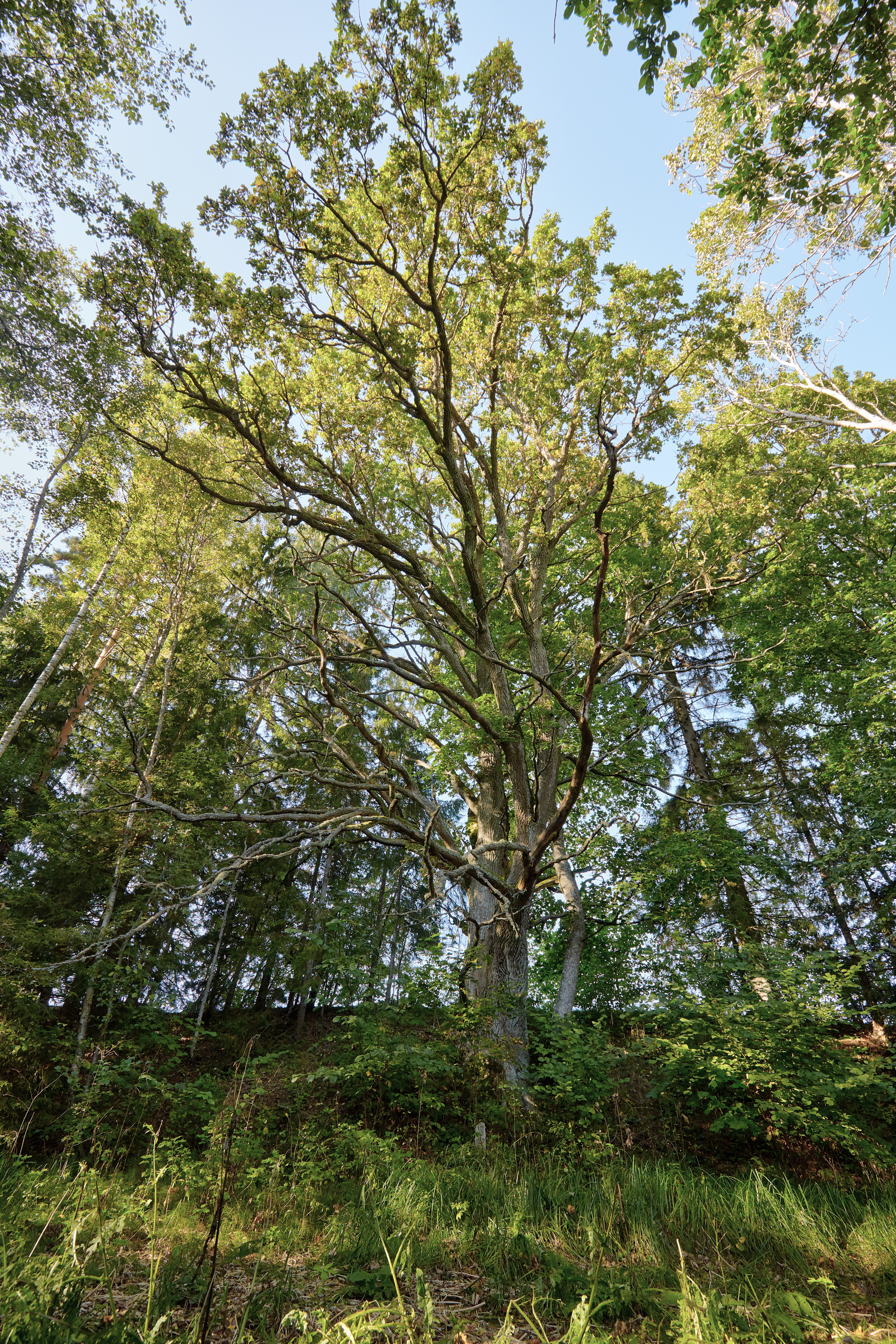 Tilleoru tamm 2017. aasta sügisel.